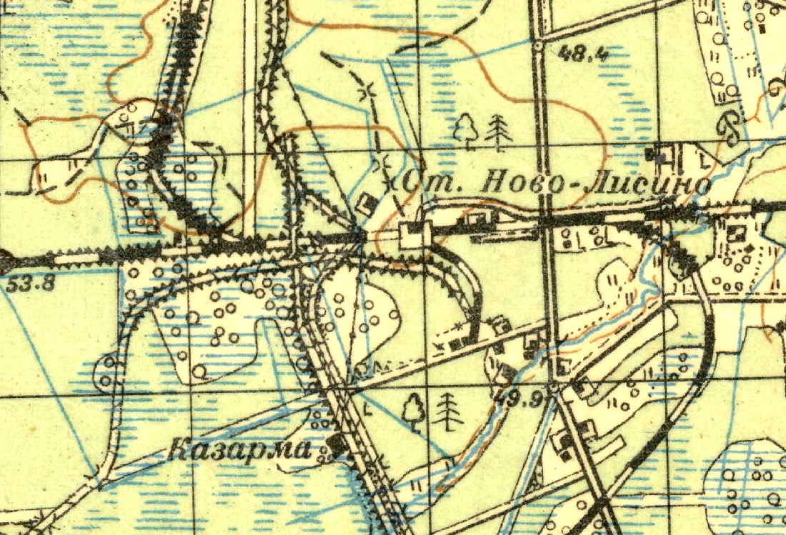 Топографическая карта Ленинградской области, квадрат О-36-14-А (п. Фёдоровский), посёлок Форносово